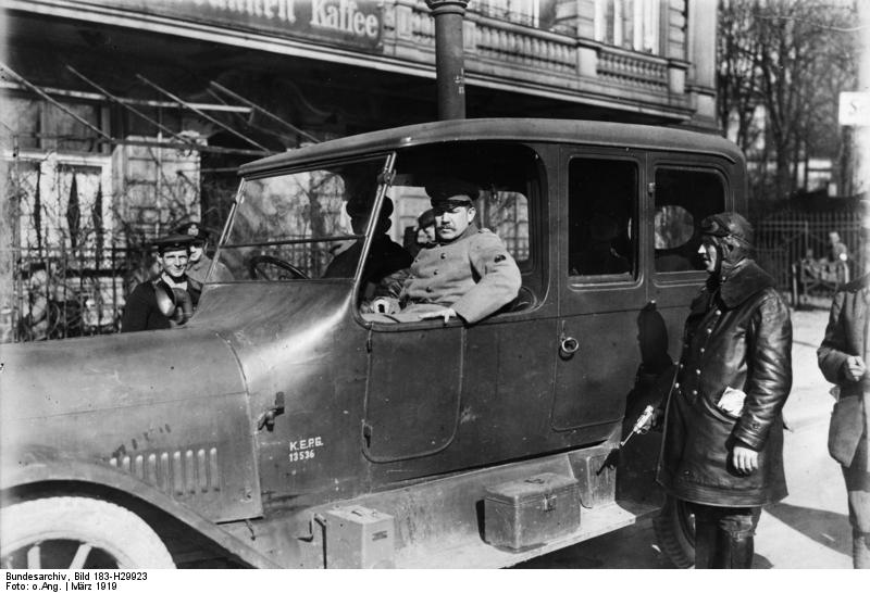 Berlin, Revolution, Wilhelm Reinhard Zentralbild Revolution 1918/19 in Deutschland Generalstreik und bewaffnete Kämpfe vom 3.-12.3.1919 in Berlin Oberst Wilhelm Reinhard, der Kommandeur des in Lichtenberg eingesetzten Freikorps-Regimentes, unternimmt vom Friedrichshain aus eine Inspektionsfahrt. Abgebildete Personen: Reinhard, Wilhelm: Oberst, SS-Gruppenführer, Bundesführer Reichskriegerbund, Deutschland